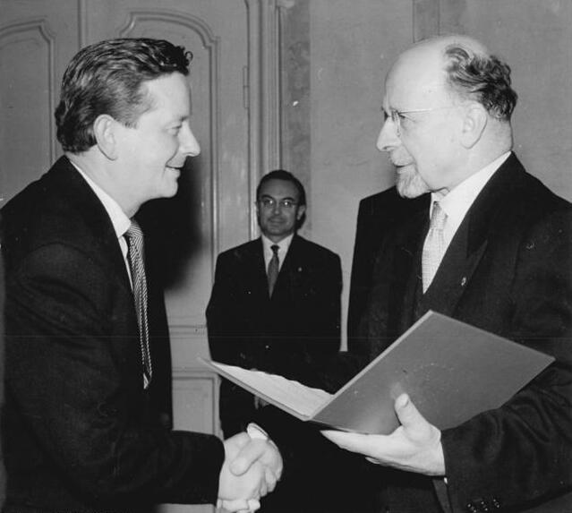 Zentralbild Zühlsdorf 17.10.1960 Vaterländischer Verdienstorden in Bronze für Prof. Wittkugel Der Vorsitzende des Staatsrates der Deutschen Demokratischen Republik, Walter Ulbricht, verlieh am 17. Oktober (unser Bild) im Amssitz des Staatsrates, dem Nationalpreisträger Prof. Klaus Wittkugel, zu dessen 50. Geburtstag, den vaterländischen Verdienstorden in Bronze. Damit werden die hervorragenden Verdienste des Künstlers als Graphiker, als Professor an der Hochschule für angewandte Kunst, und als Mitglied des Präsidiums des Verbandes der bildenden Künstler Deutschlands gewürdigt.